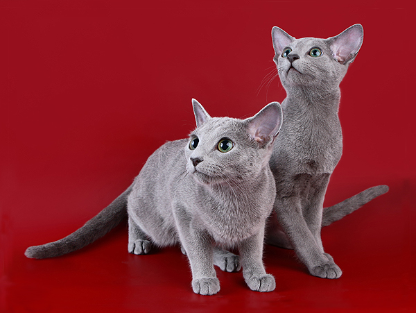 Russisch Blau vergleich Amerikanisch/Europäisch